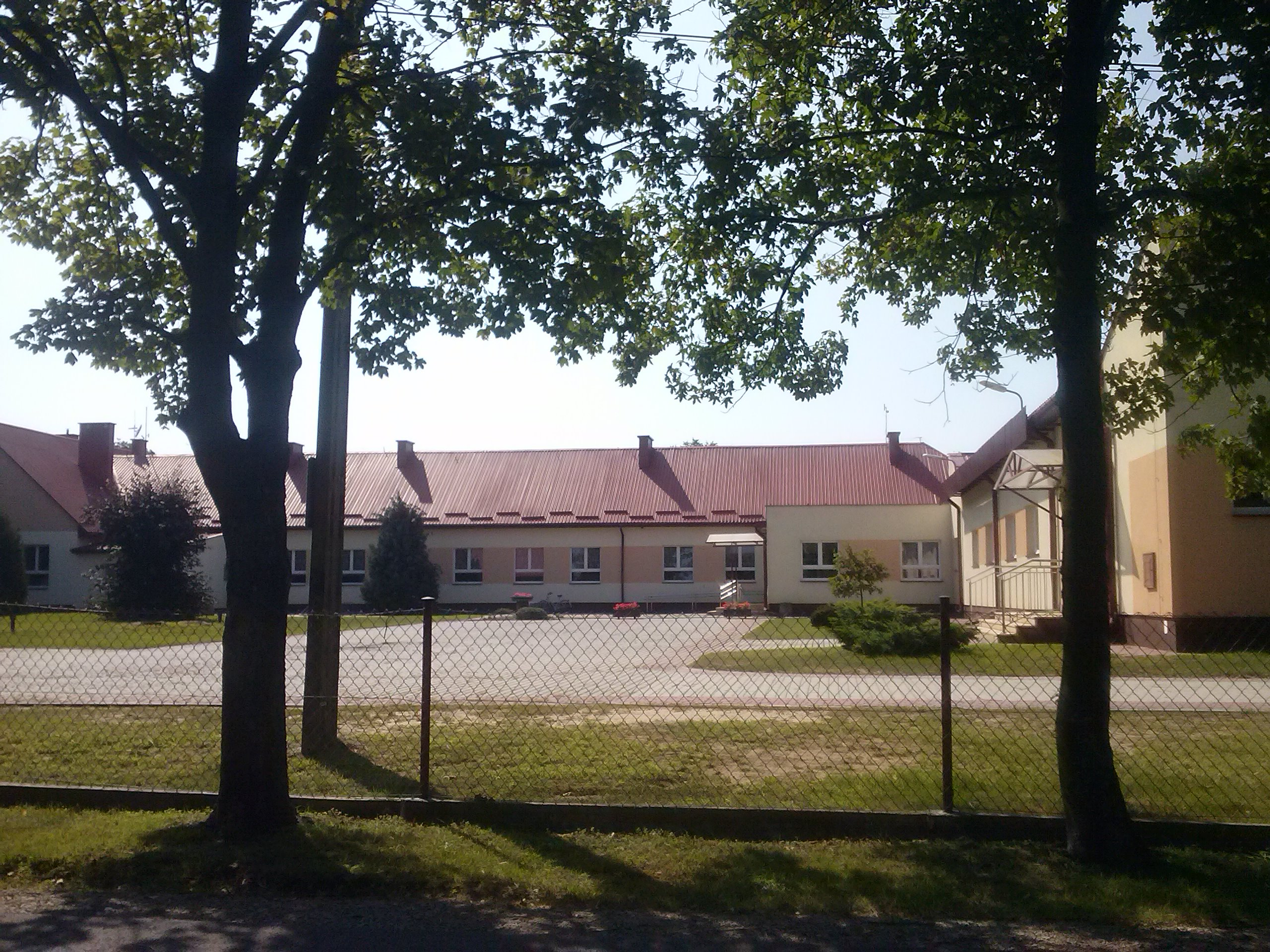 Szkoła podstawowa im. Stanisława Kostki w Chałupkach Dębniańskich (część nowa)